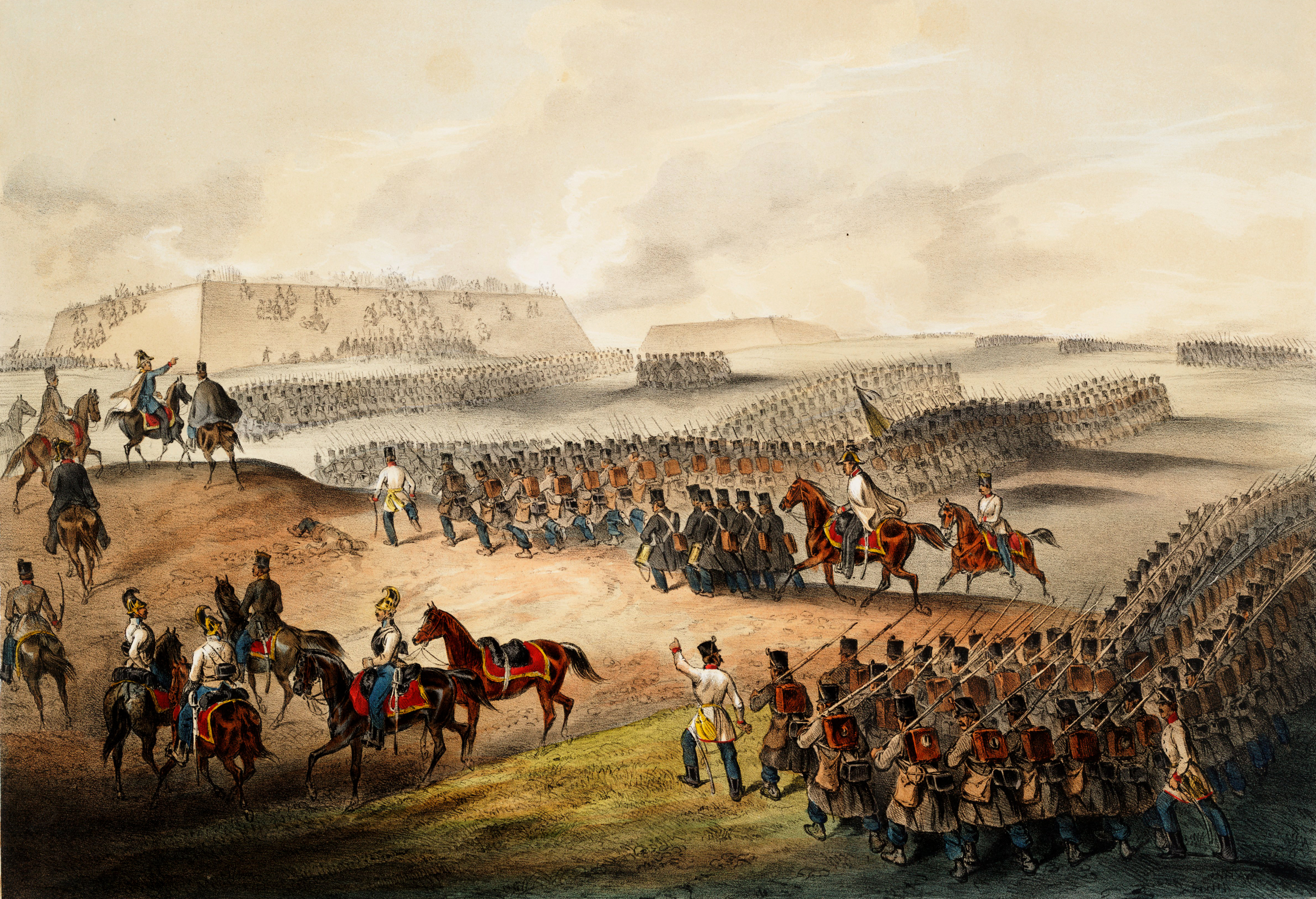 A második komáromi csatára július 2-án került sor. Haynau osztrák fővezér és Schlick tábornok ezen a napon összehangolt támadást intézett Komárom ellen. Reggel 5 órakor indult meg az osztrákok támadása, a magyar jobb szárny és a közép parancsnokságát Görgey, a bal szárnyét Klapka vette át. A Mocsa ellen előnyomuló ellenség ellen Leiningen-Westerburg Károly lovassága vette fel a harcot, a huszárok azonban kezdeti sikerek után hátrálni kényszerültek. A túlerőt látva Klapka visszavonta csapatait Szőnyből az újszőnyi sáncok mögé.